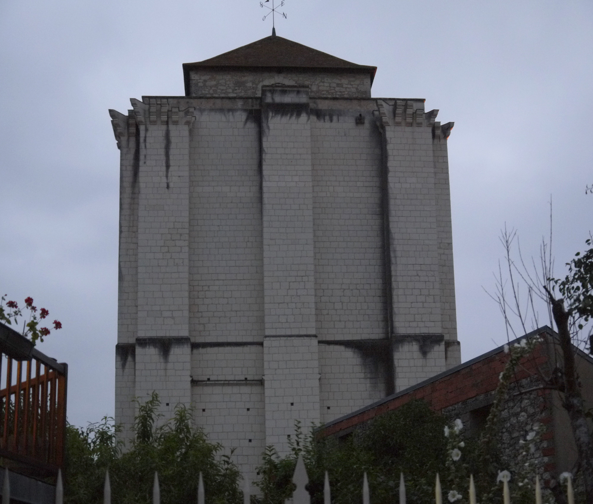 Le donjon de La Roche-Posay - partie haute, vue d'une face